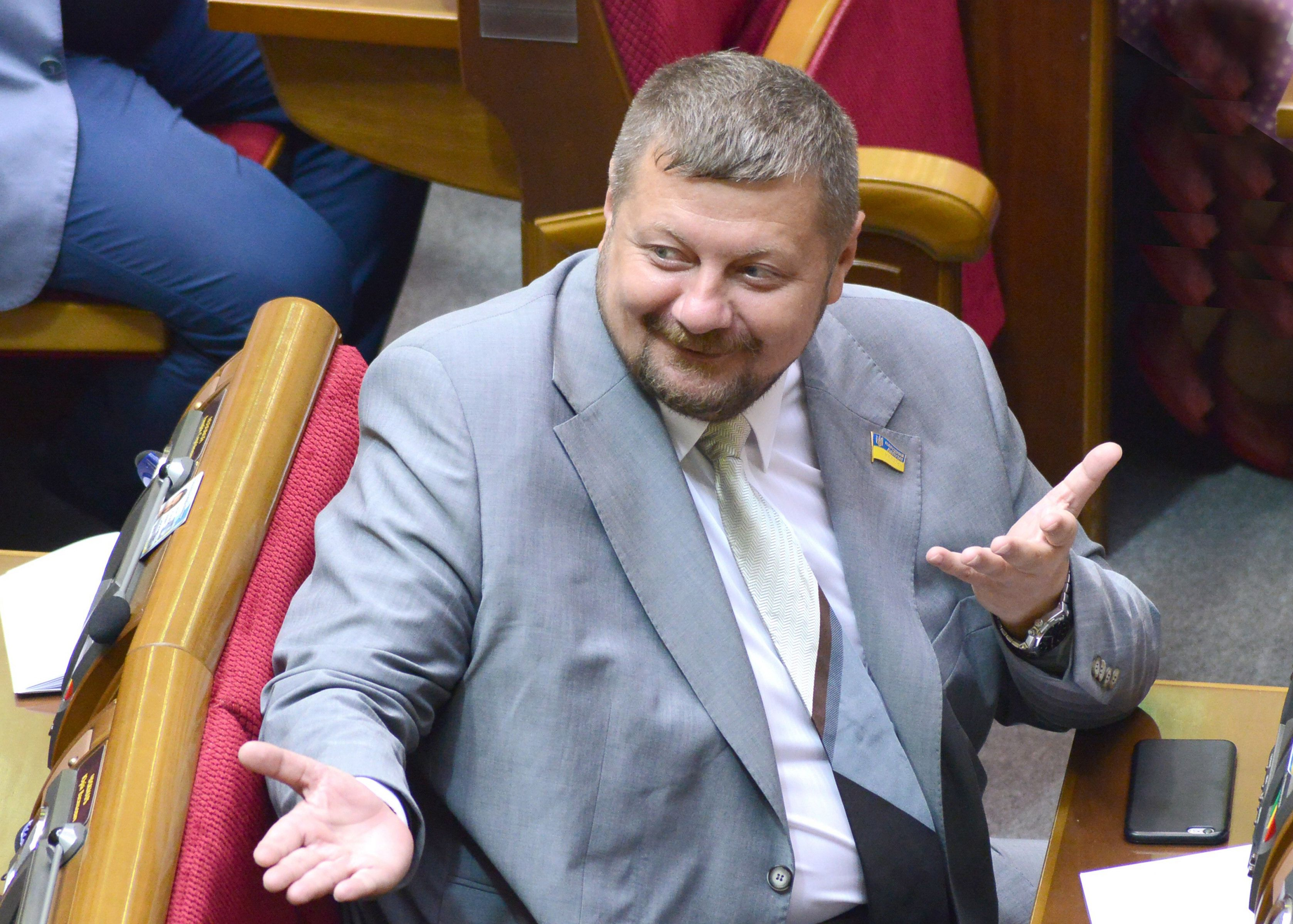 ВЕРХОВНА РАДА УКРАЇНИ 2015 фотограф Вадим Чуприна